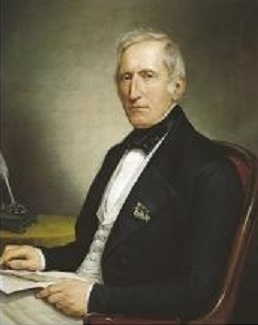 Ritratto di Luigi Porro Lambertenghi, olio su tela, Galleria d'arte moderna, Milano